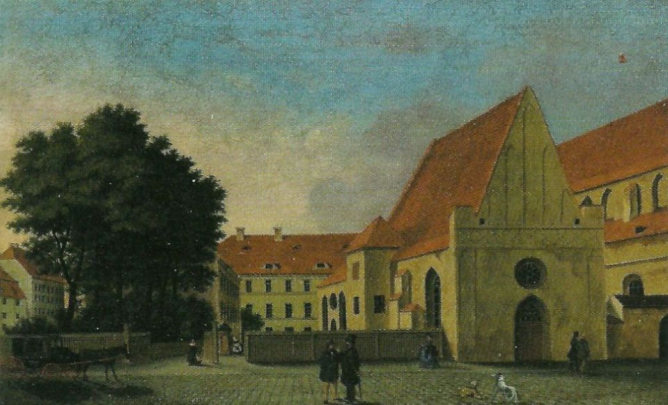 Obraz Szpital św. Trójcy Heinricha Boshardta z ok 1840 z kolekcji MNWr nr inw. VIII-1122.